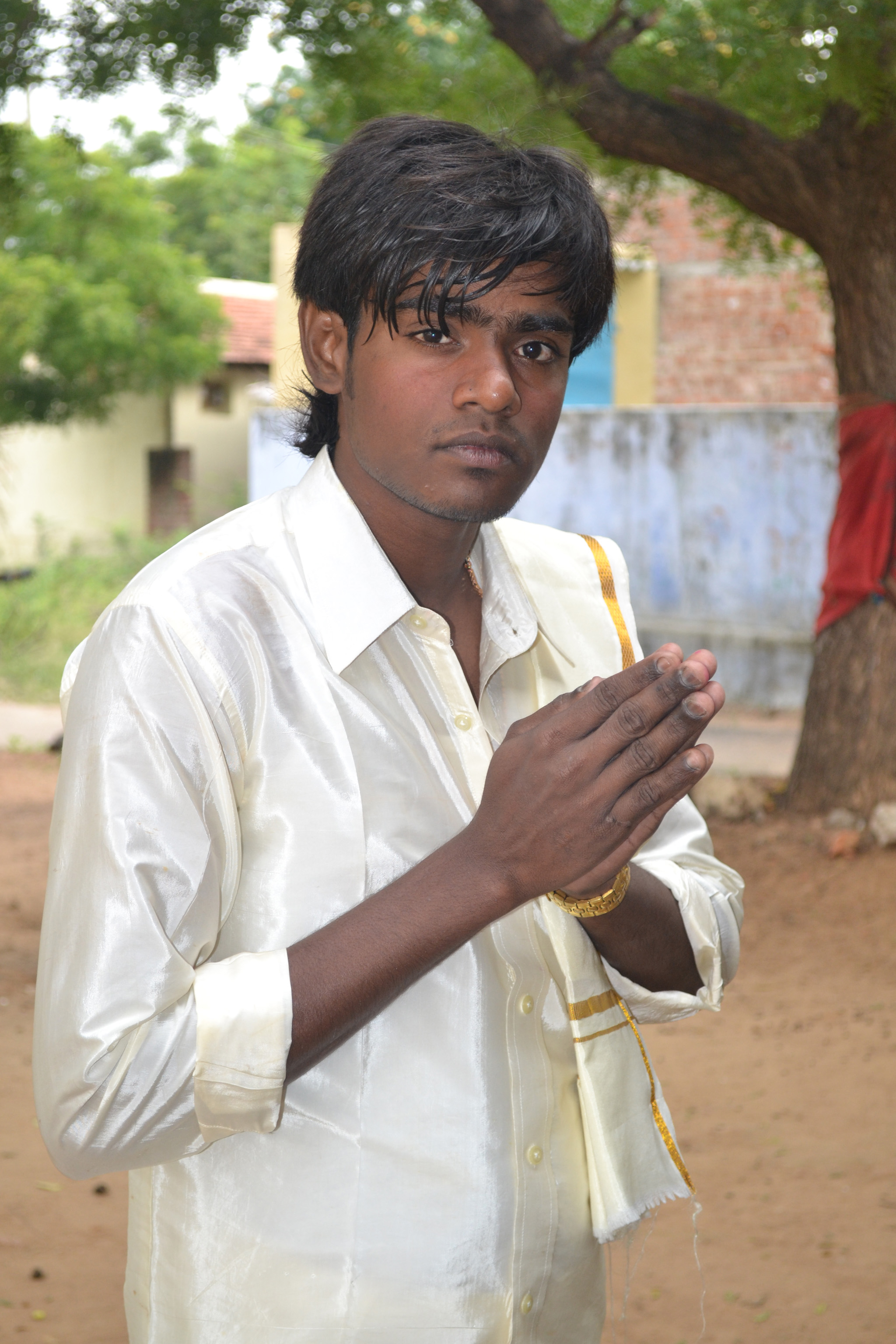 கிராமத்தில் இருக்கும் வேப்பமர சாமி